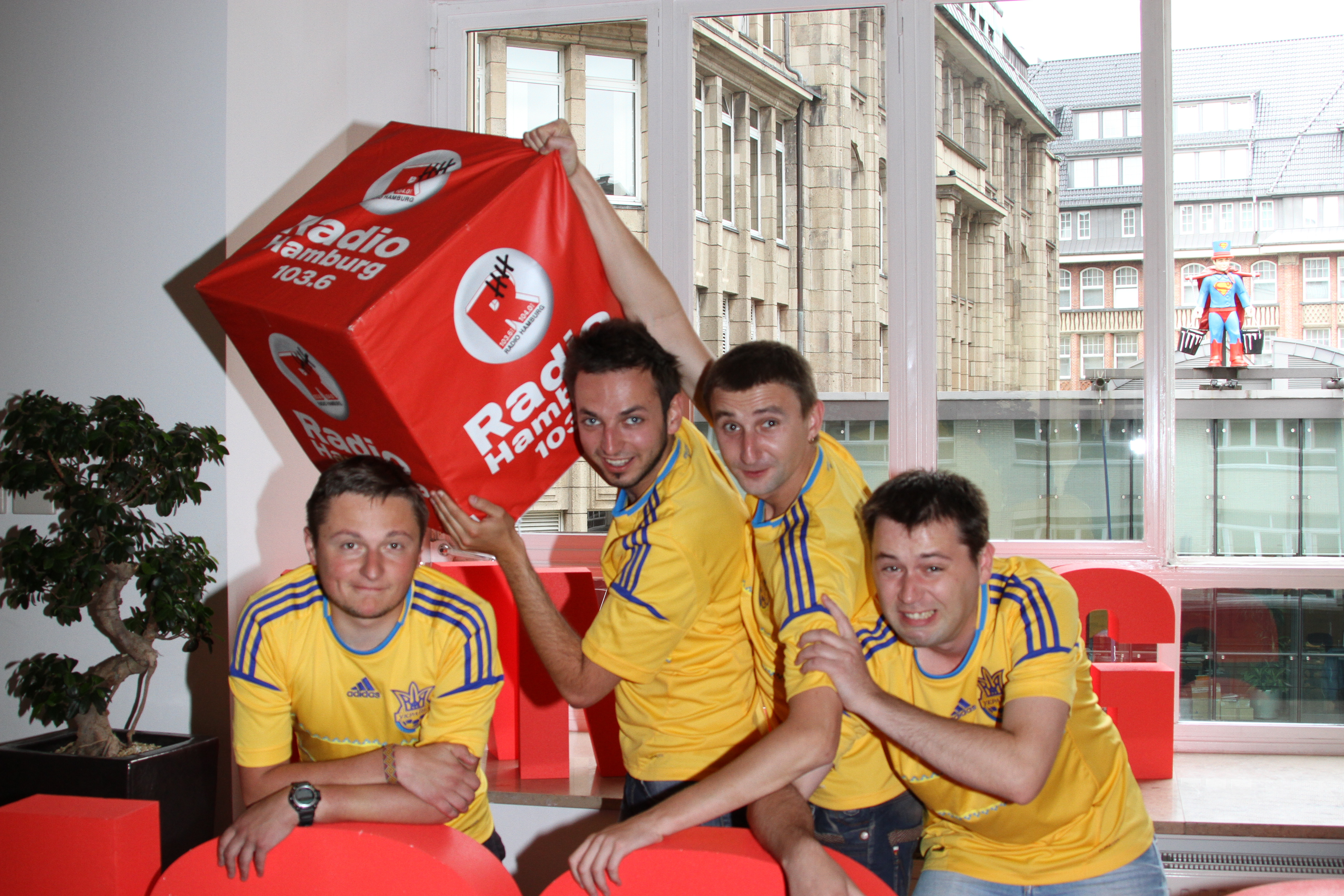 Los Colorados (ukrainisch: Лос Колорадос, kommt aus der ukrainischen Übersetzung des Kartoffelkäfers) ist eine ukrainische Band, gegründet 2006 in Ternopil. Besuch bei Radio Hamburg